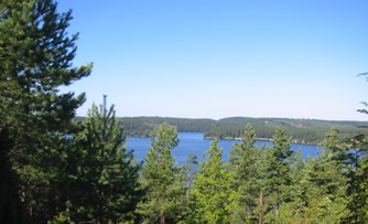 Utsikt över sjön Sommen